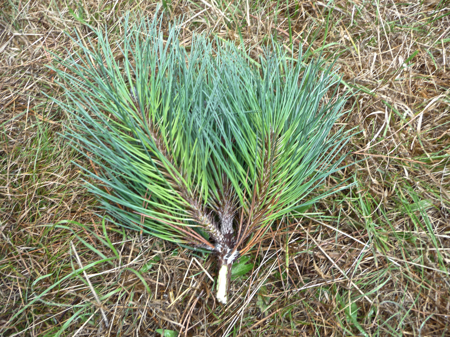 Pinus muricata foliage, Mendocino, California